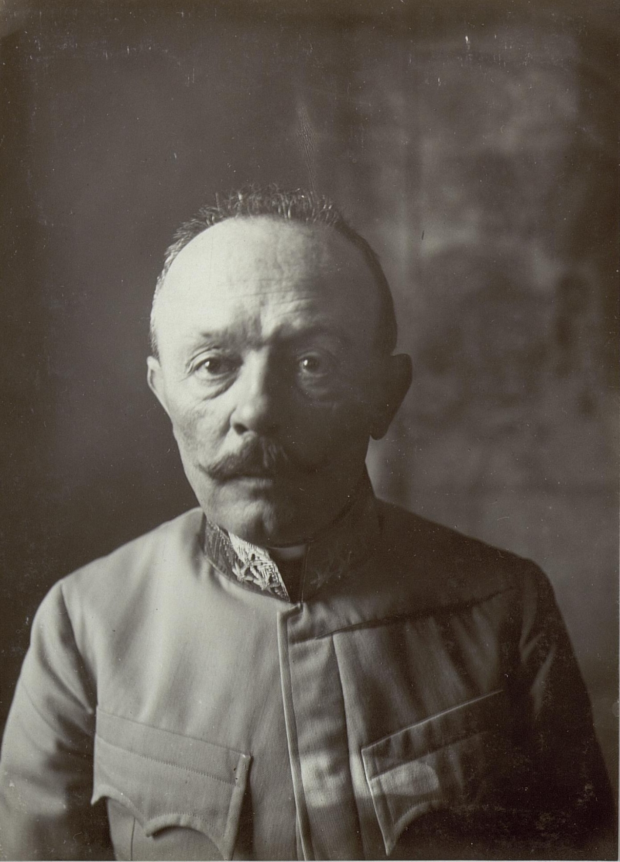 Feldmarschall Svetozar Boroevic von Bojna, General der Infanterie, Kommandeur der 5. Armee, Frontalaufnahme des Gesichts.